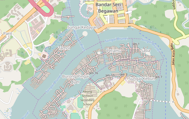 Kampong Ayer, Brunei from OpenStreetMap